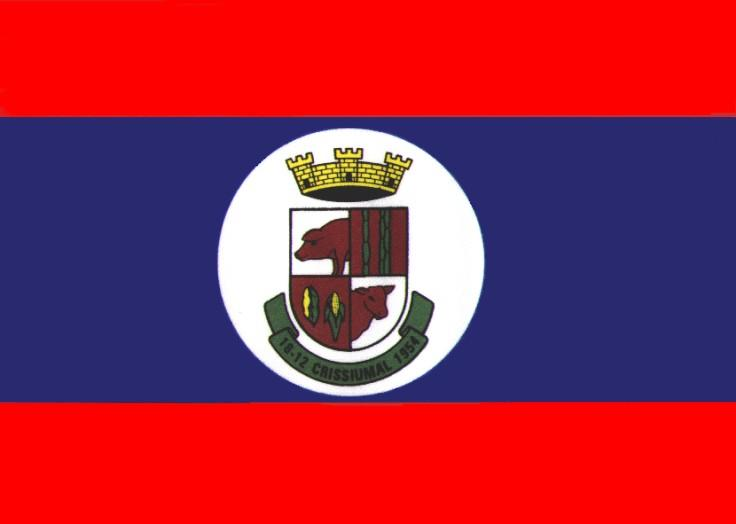 Bandeira Crissiumal